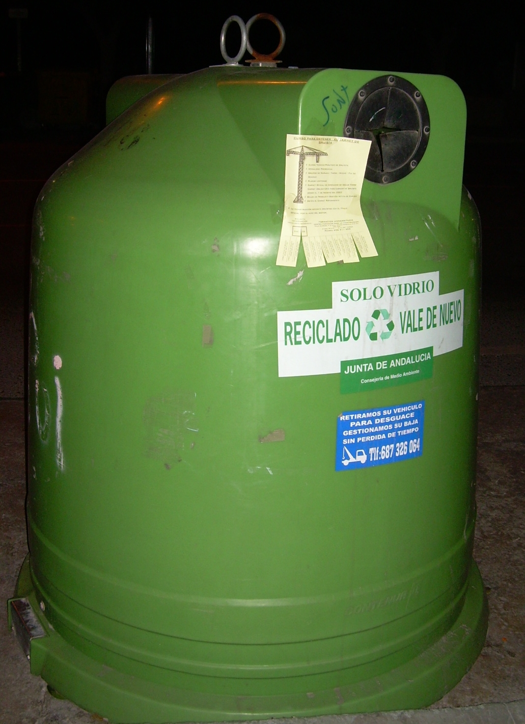 Contenedor de Vidrio para su posterior reciclaje, Alh de la Torre, España. Glass Recycling container, Spain.